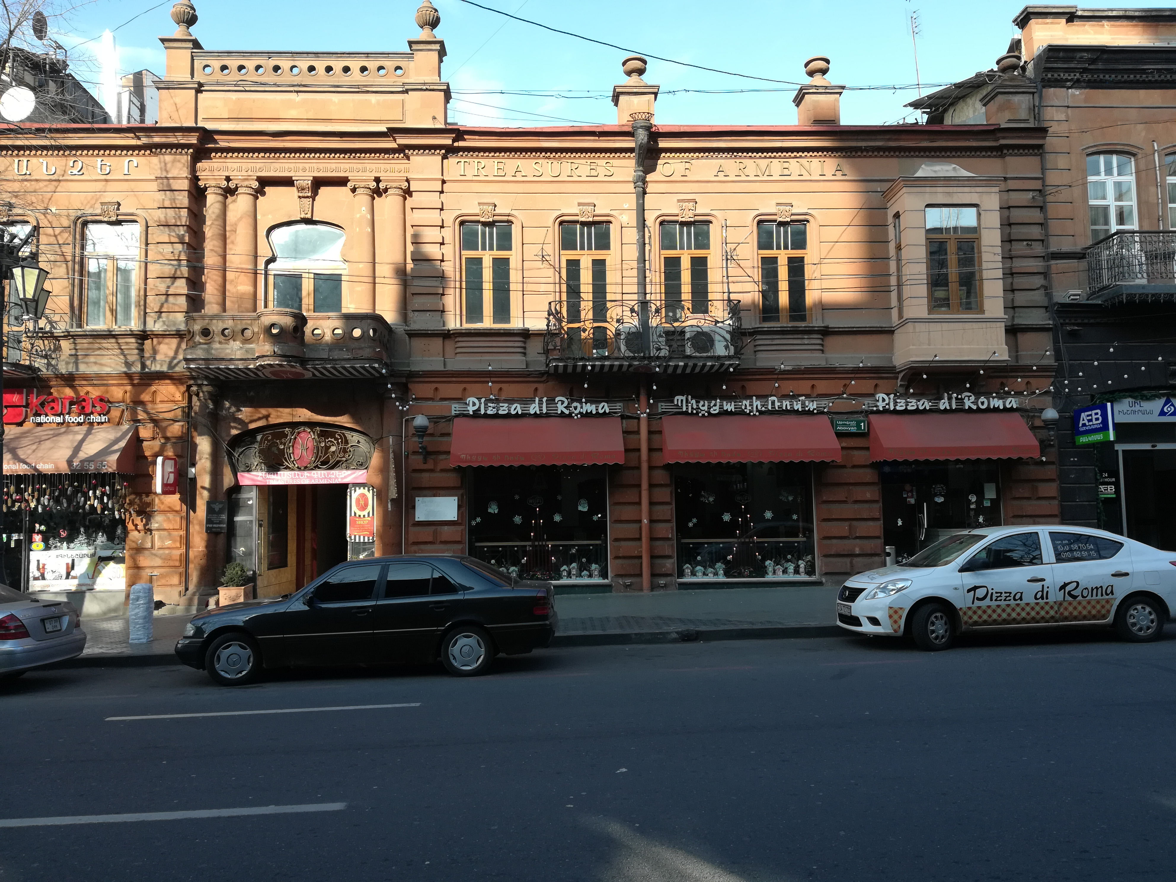 Улица Абовяна (Ереван), д. 1